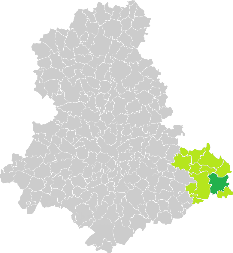 Carte de situation de la commune de Nedde (en vert foncé) dans le votre Canton (en vert clair) sur une carte des communes de la Haute-Vienne